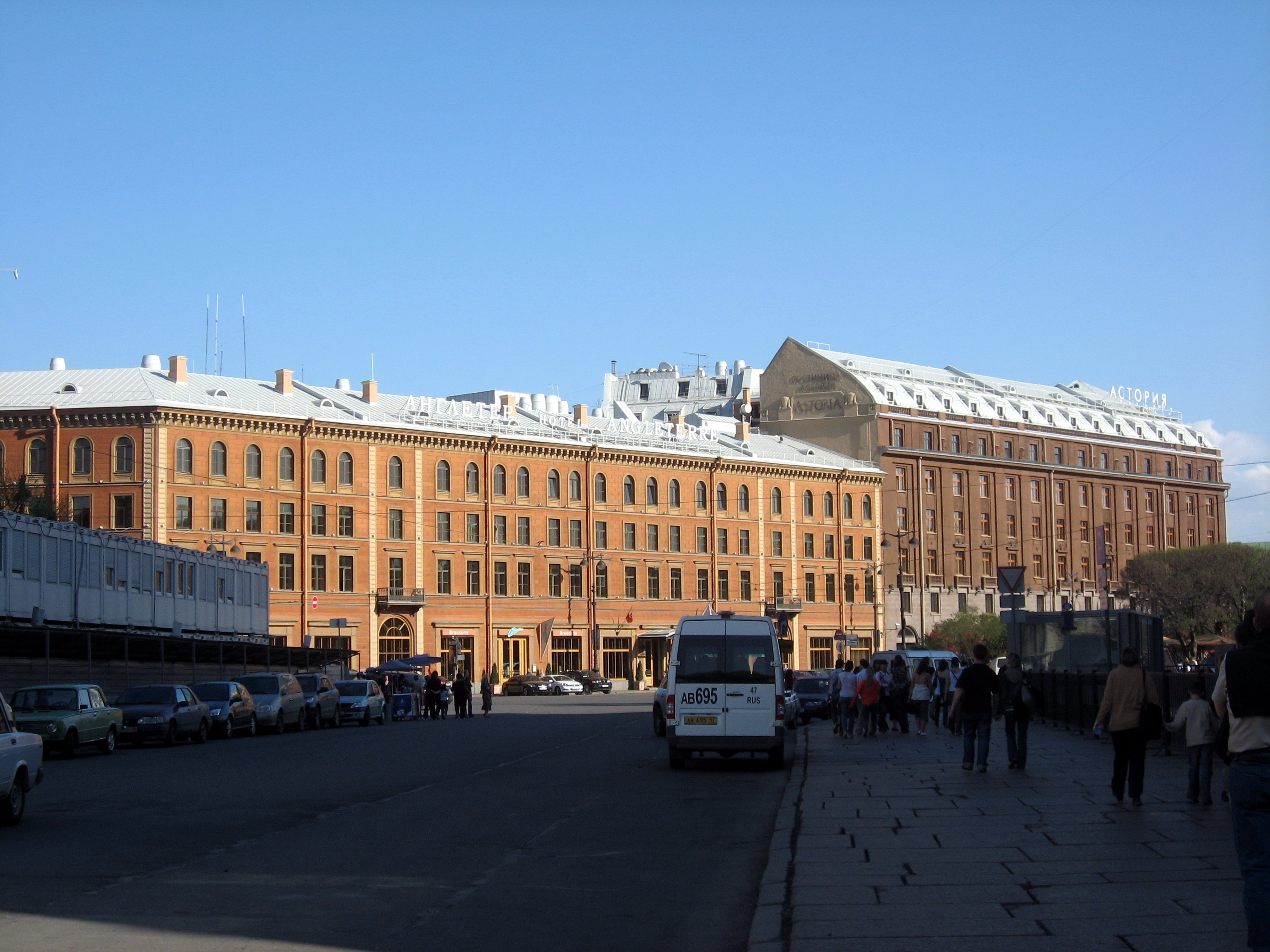 Sankt-Petěrburg